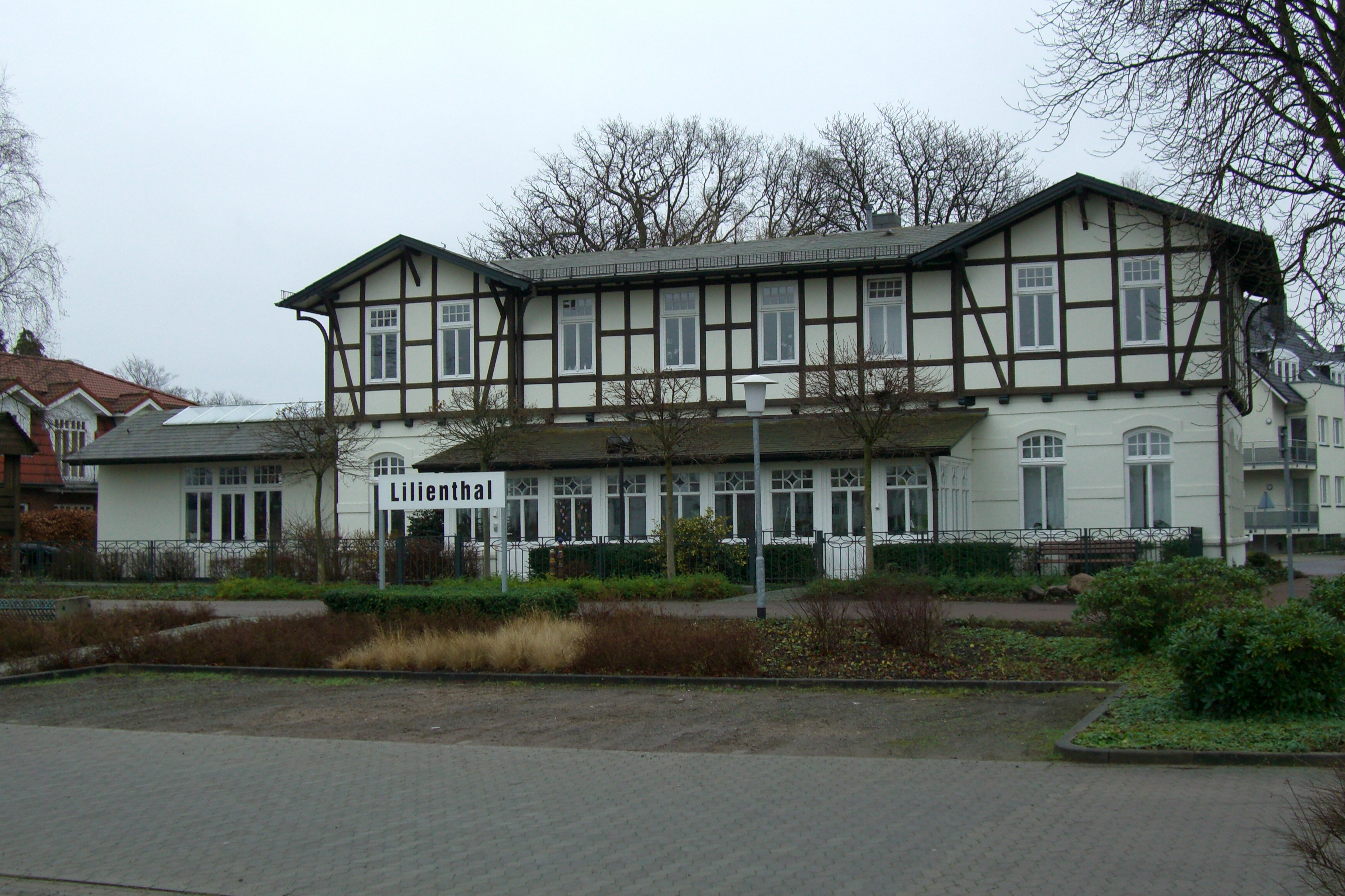 ehemaliger Bahnhof Lilienthal der ehemaligen Kleinbahn Bremen-Tarmstedt, genannt Jan Reiners, Ansicht von Süden. Standort: Lilienthal/Niedersachsen